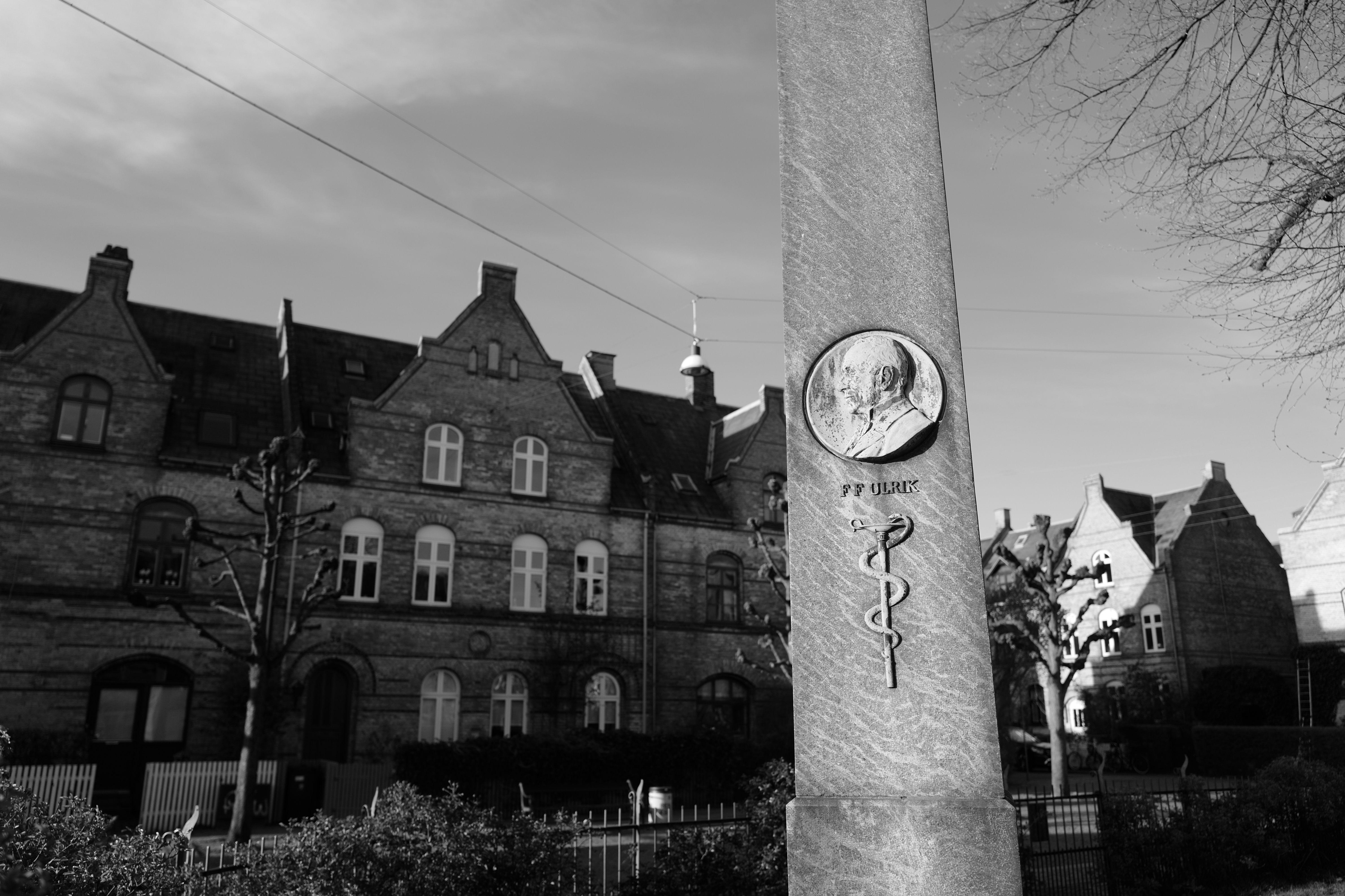 Frederick Ferdinand Ulrik